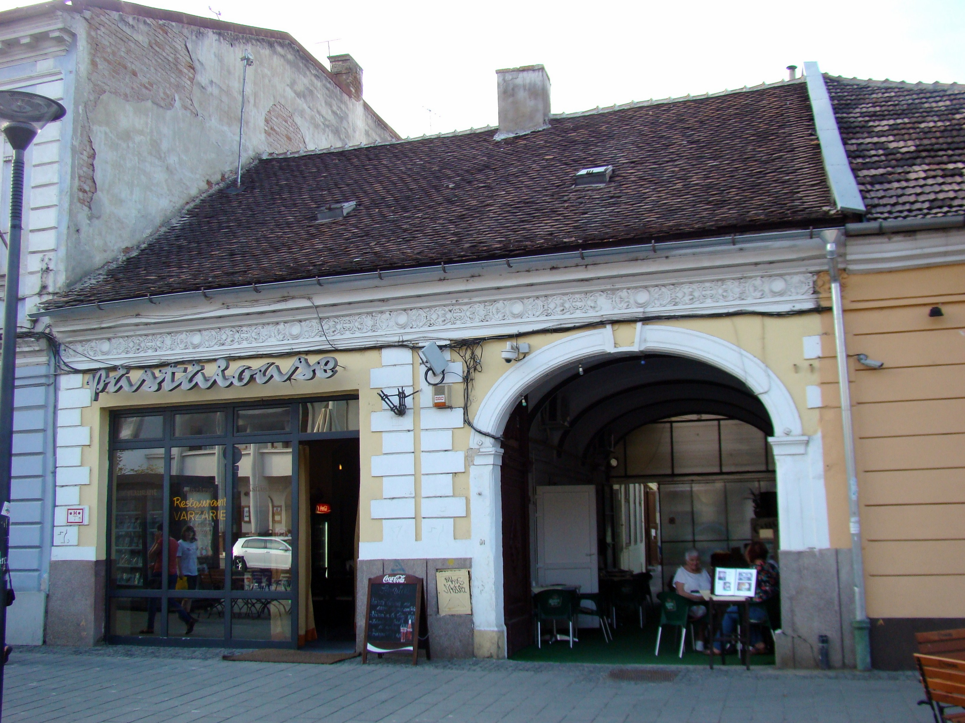 Clădire monument istoric, Bd.Eroilor, nr. 37